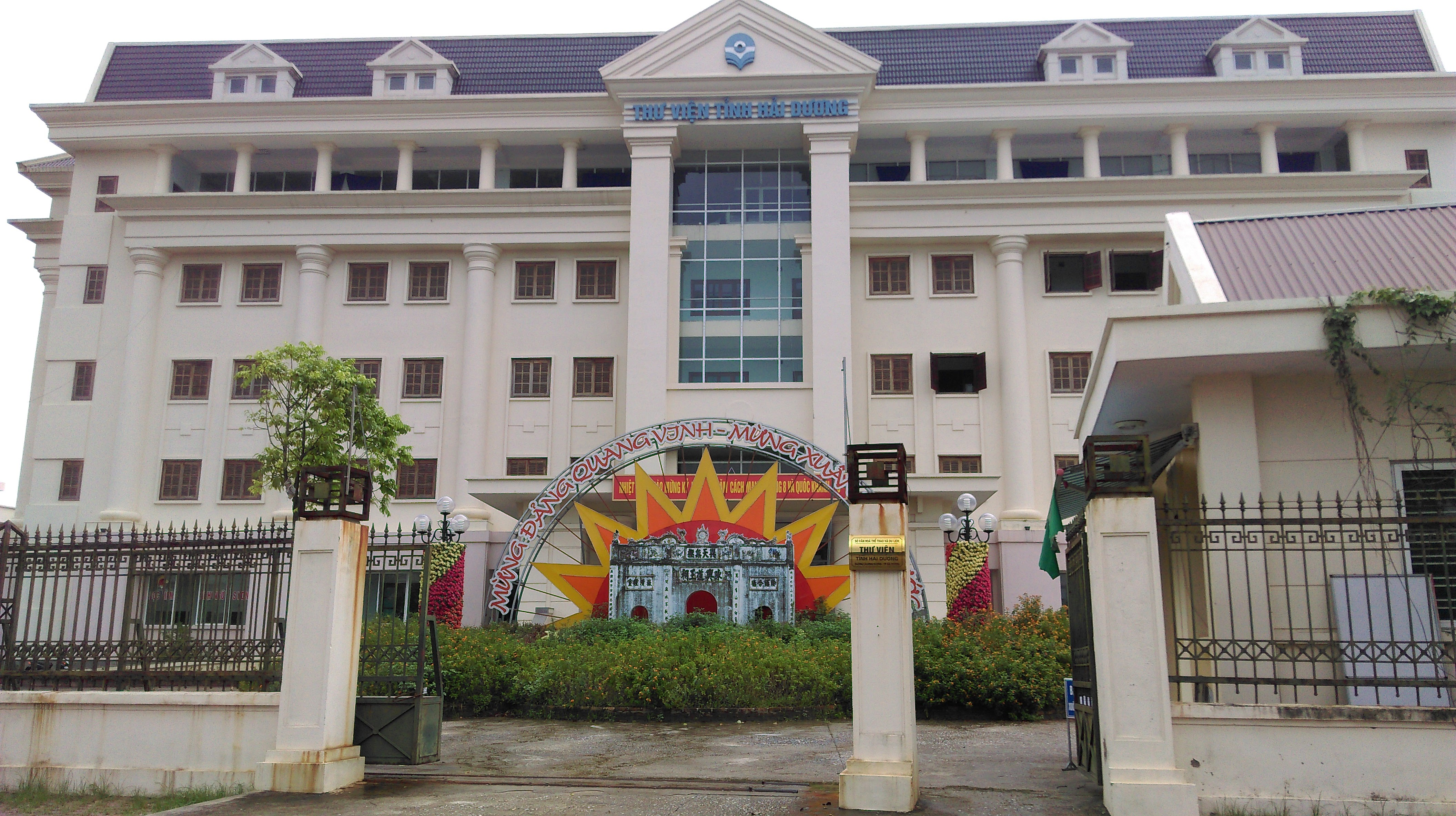 Thư viện tỉnh Hải Dương